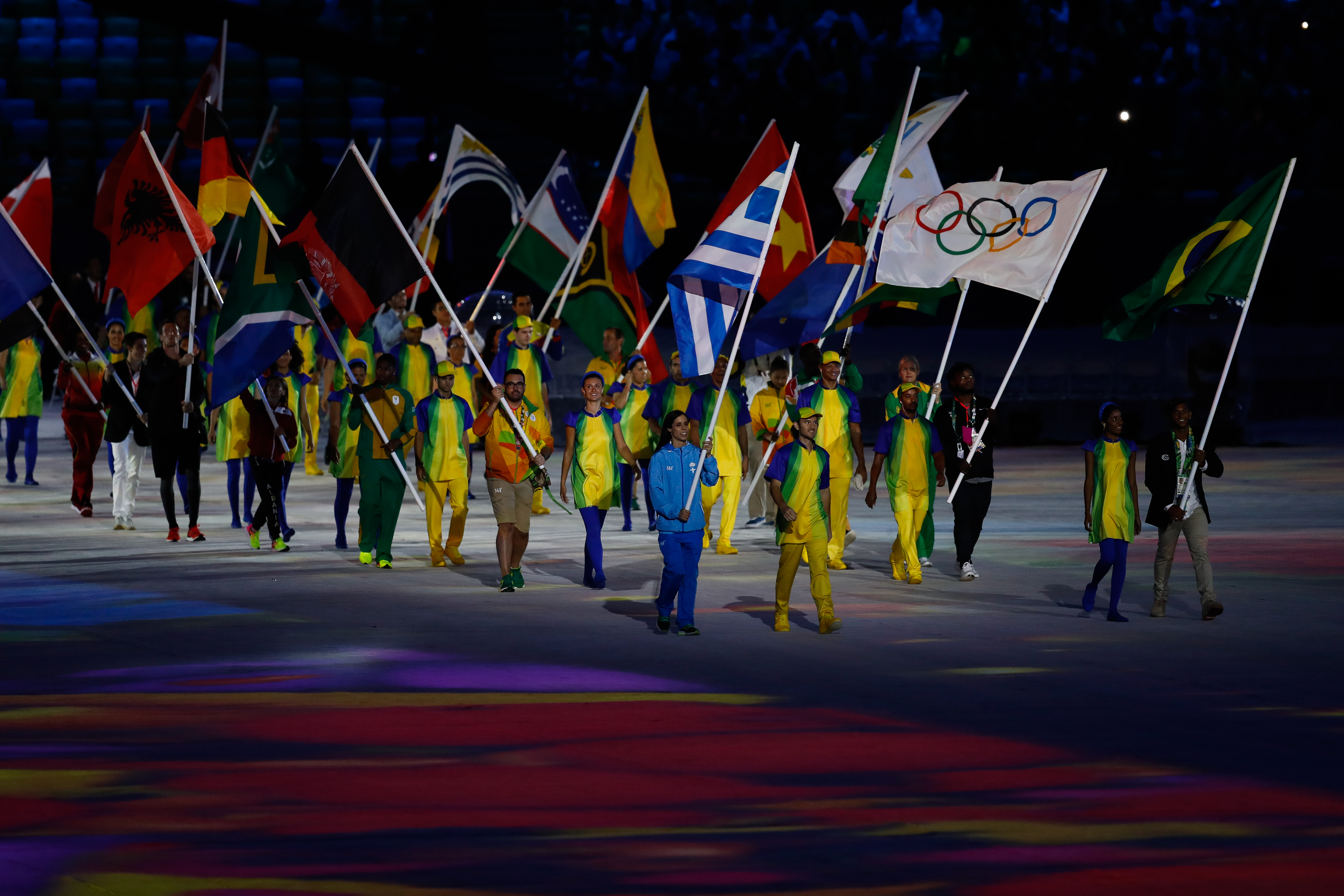 Rio de Janeiro - Cerimônia de encerramento dos Jogos Olímpicos Rio 2016, no Maracanã (Fernando Frazão/Agência Brasil)